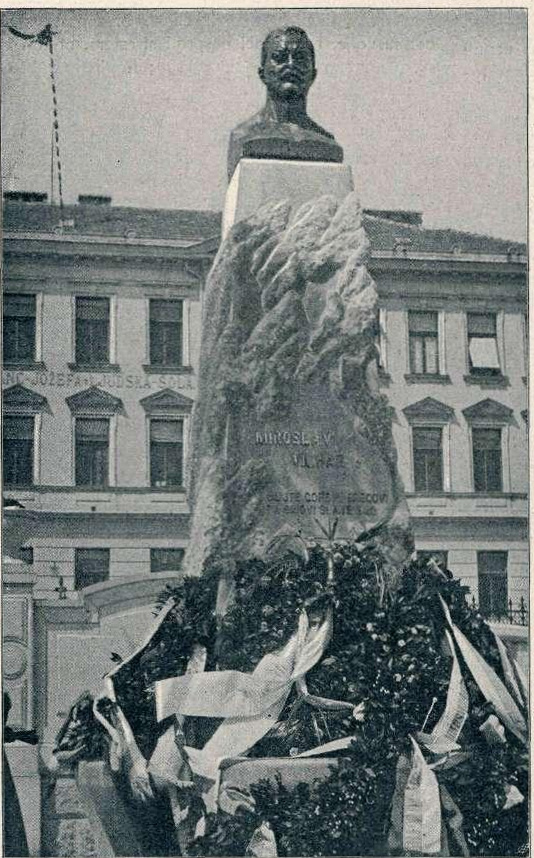 Vilharjev Spomenik v Postojni.